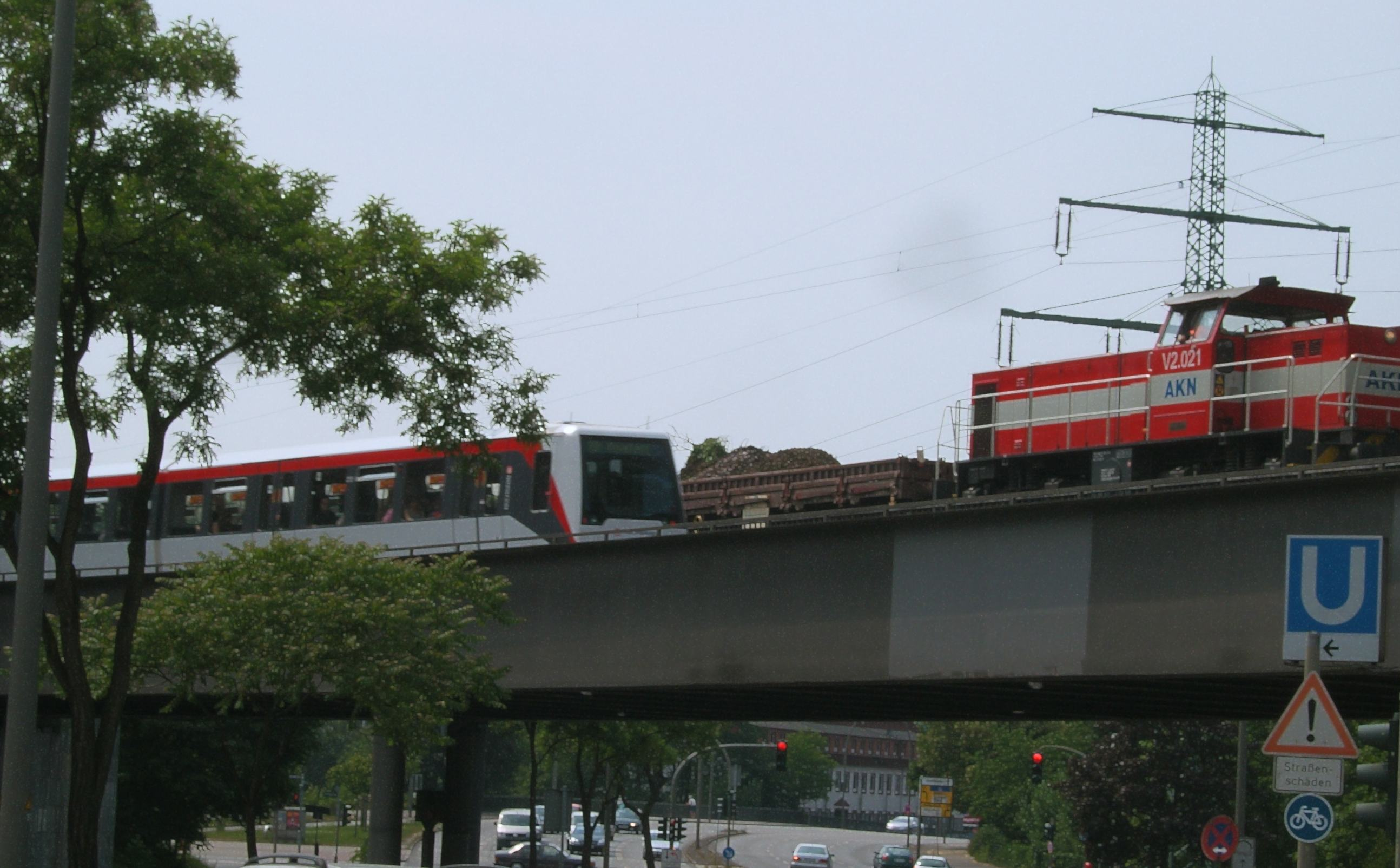 Hamburg, Brücken der U- und Güterumgehungsbahn über den Straßenring 2